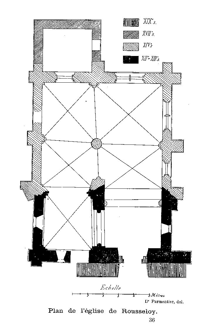 Plan des masses de l'église au début du XXe siècle.